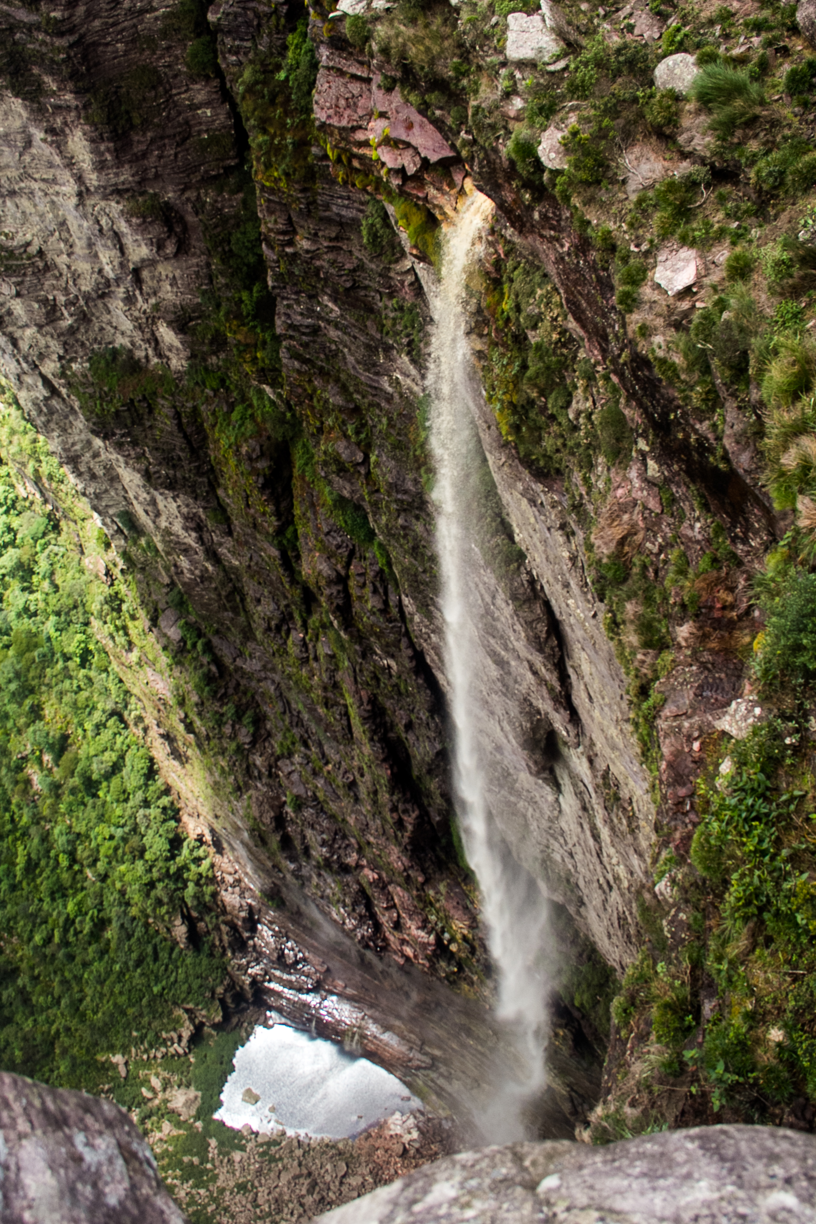 Vista de cima da Cachoeira da Fumaça, com 380m de altura.